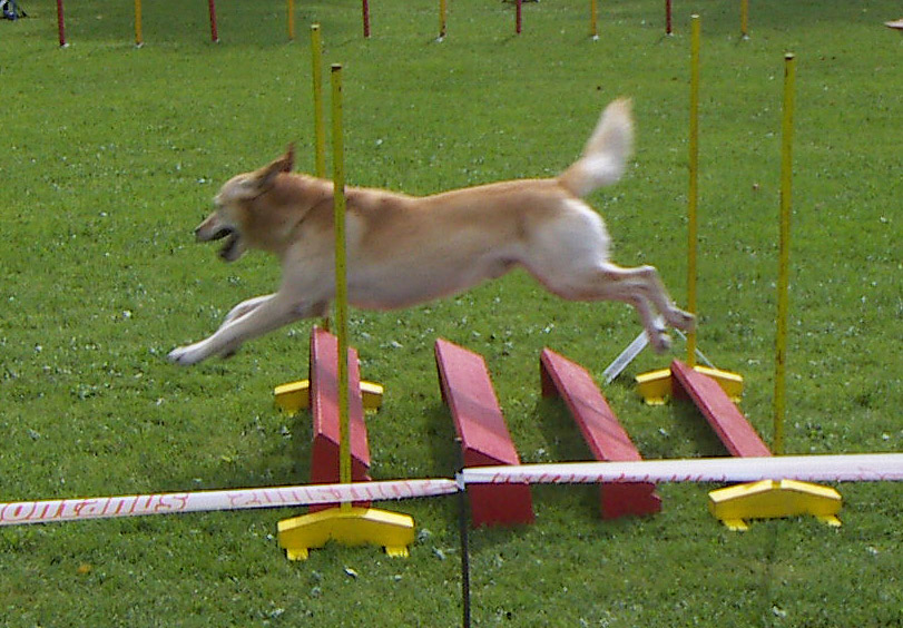 Agility Weitsprung